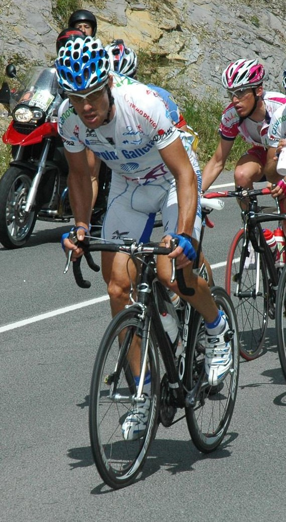 David García, Euskal Bizikleta 2008, 1st stage.